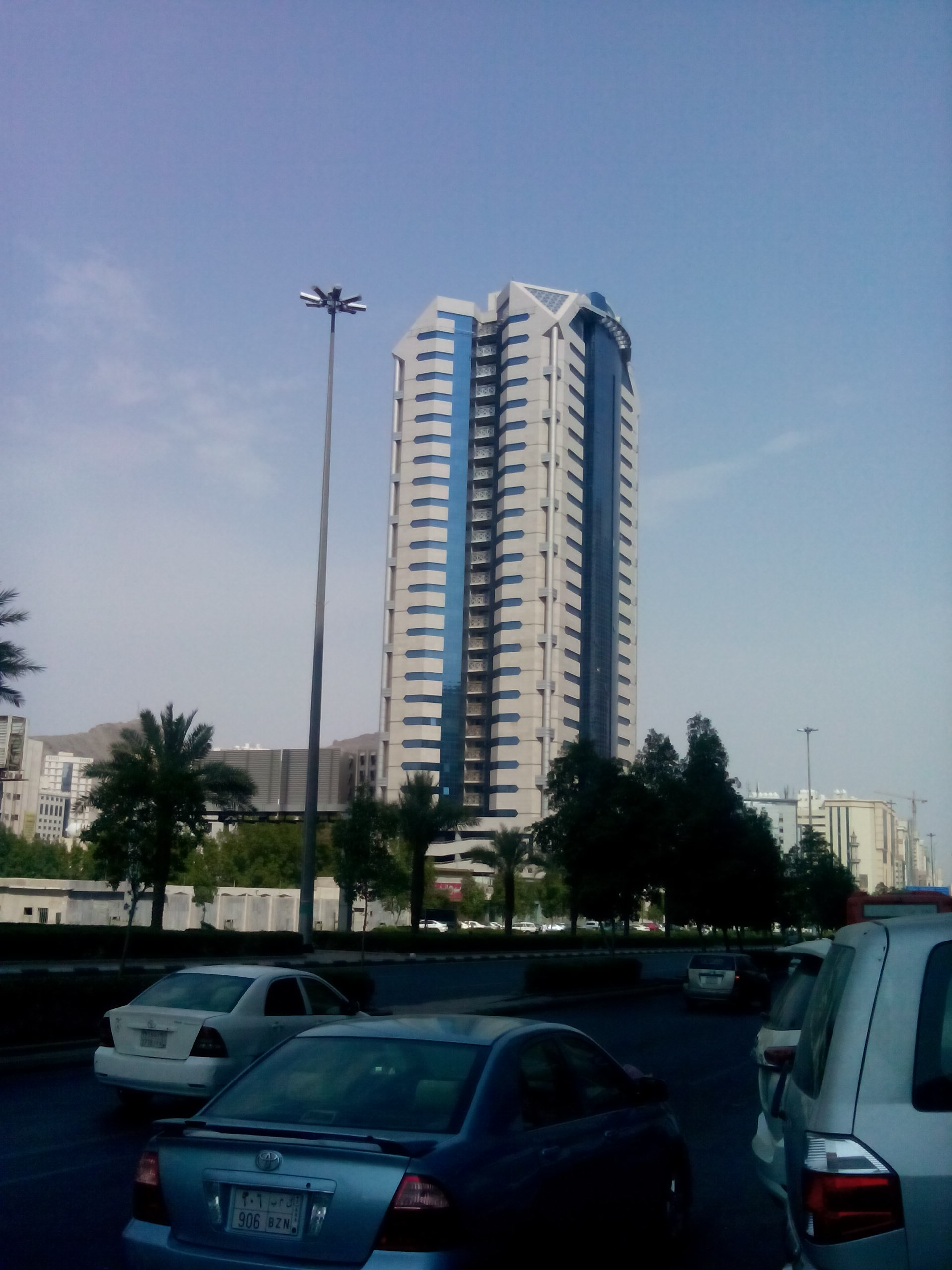 مبنى برج الاتصالات في منطقة العزيزية في مدينة مكة 2018